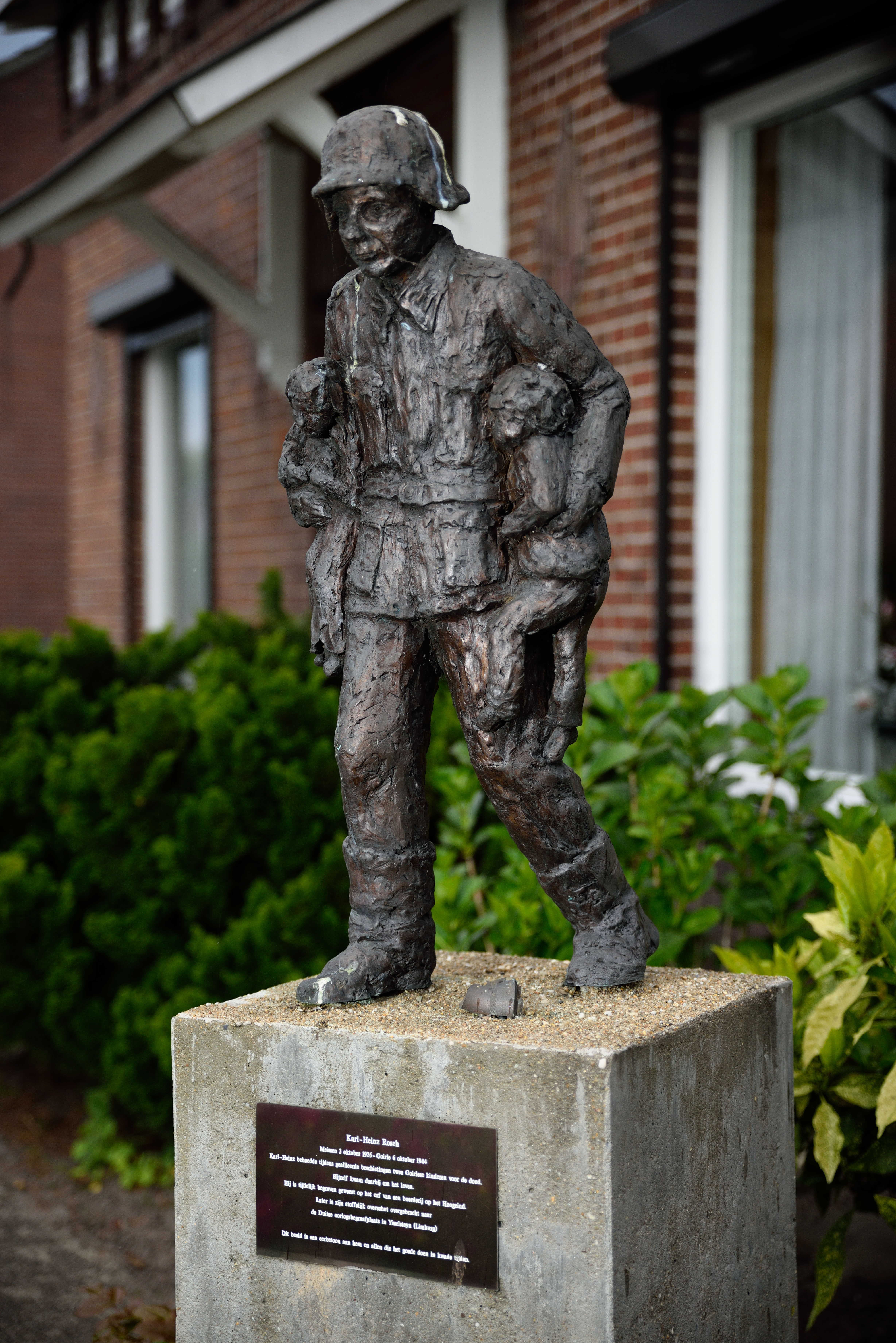 Monument voor Karl-Heinz Rosch in Riel (gem. Goirle) in de voortuin van een woning aan de Dorpsstraat.